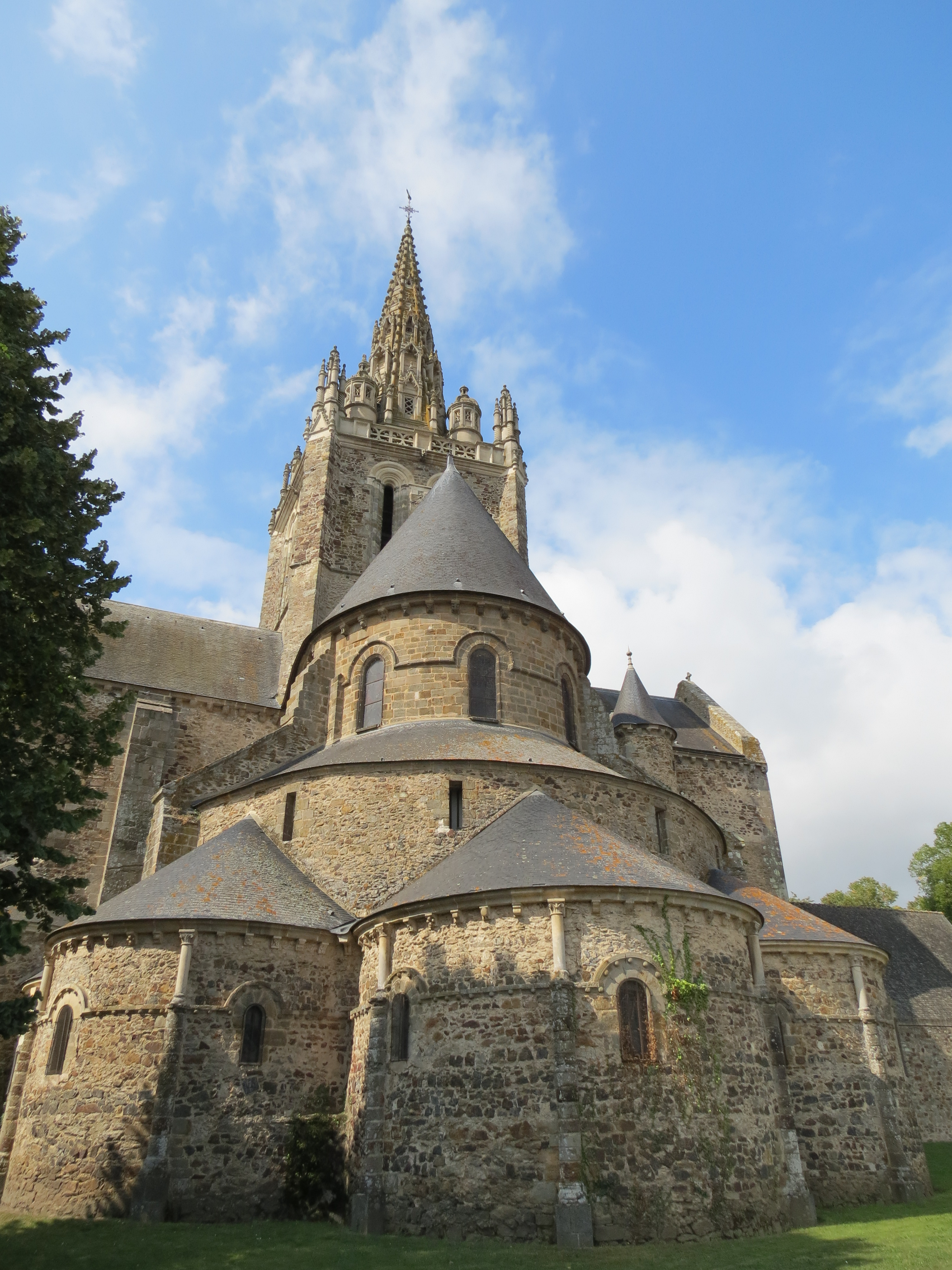 Basilique Notre-Dame d'Avesnières, Laval, Mayenne, Pays de la Loire.